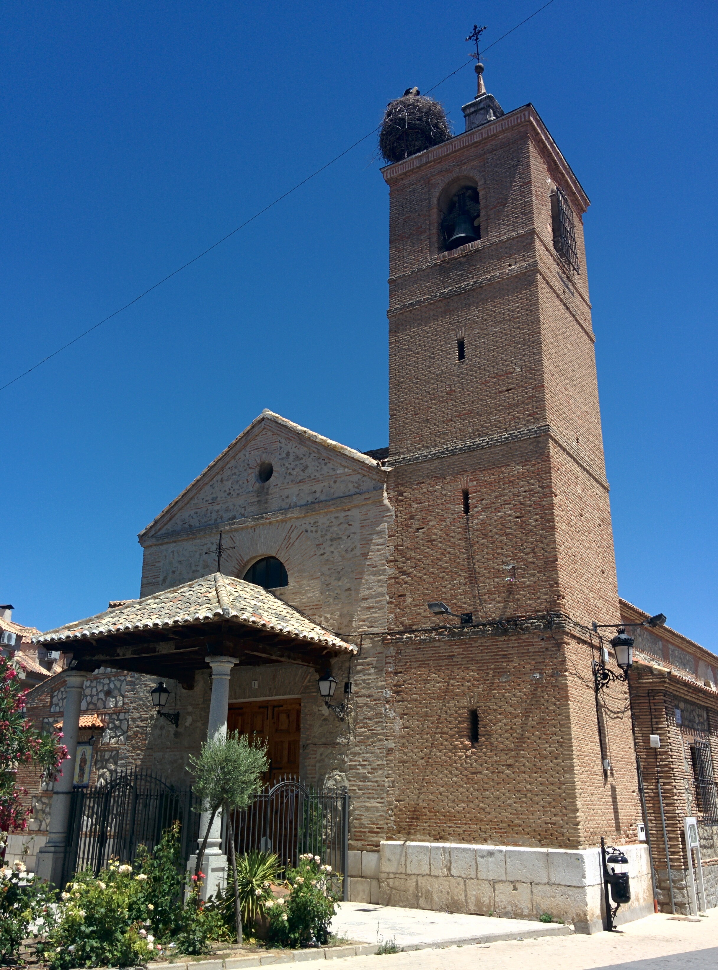 Iglesia de Nuestra Señora de la Asunción, en Numancia de la Sagra (Toledo, España).